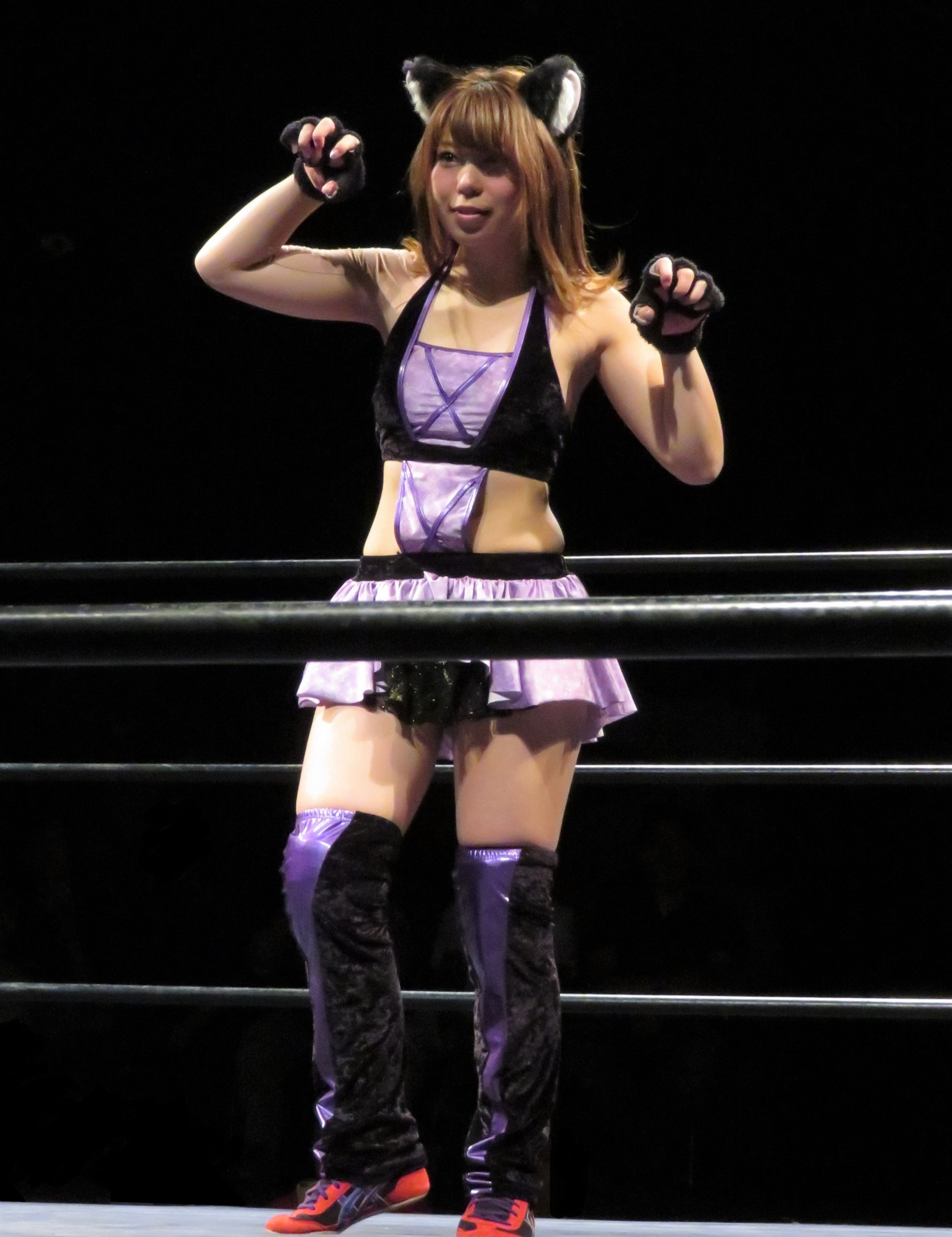 角田奈穂の画像